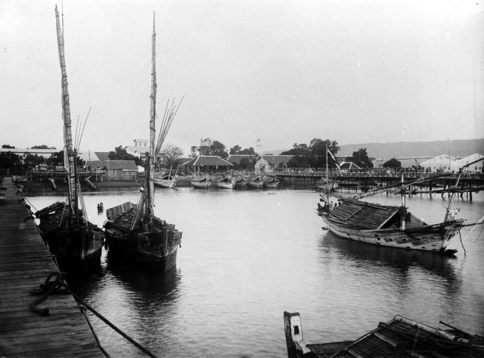 Repronegatief. Gezicht op de haven van Tjilatjap, residentie Banjoemas, Java